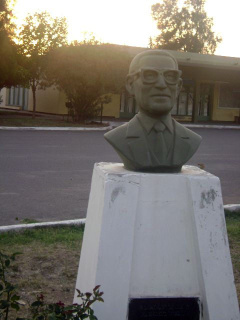 Busto en homenaje al autor del tango canción Caminito, ubicado en la terminal de ómnibus de Olta, La Rioja, Argentina